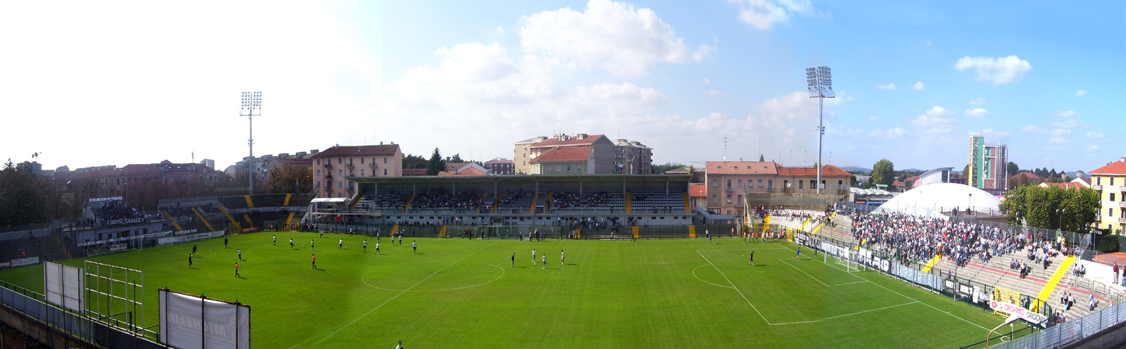 Stadio "Giuseppe Moccagatta", Alessandria, Italy